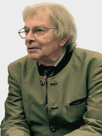 Rudolf Kellermayr 2010, das Foto von Maria Dilena wird mit schriftlicher Erlaubnis der Fotografin vom 11. Dezember 2013 hochgeladen